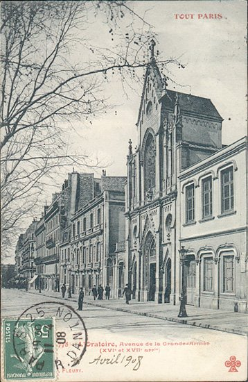 Cartes postales anciennes à Paris du Temple de l'Étoile 56 avenue de la Grande Armée (1908) sur le site